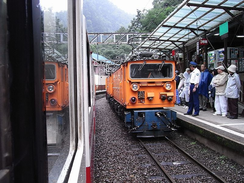 黒部峡谷鉄道本線 Ricoh R8